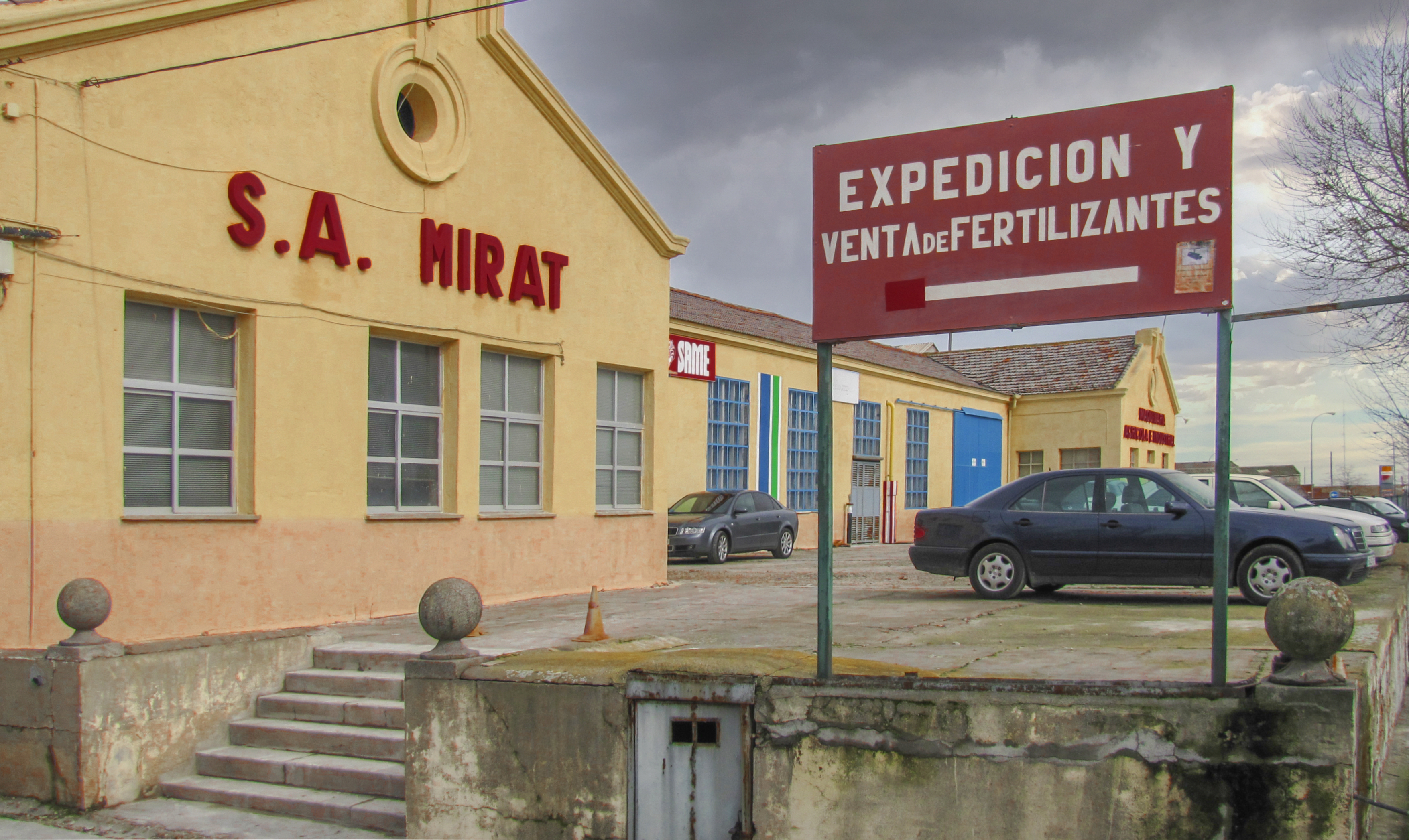 Instalaciones de la empresa S.A. Mirat en Salamanca (España). Situadas en la Avenida de la Aldehuela. En la fotografía se puede leer el cartel: "Expedición y Venta de Fertilizantes".